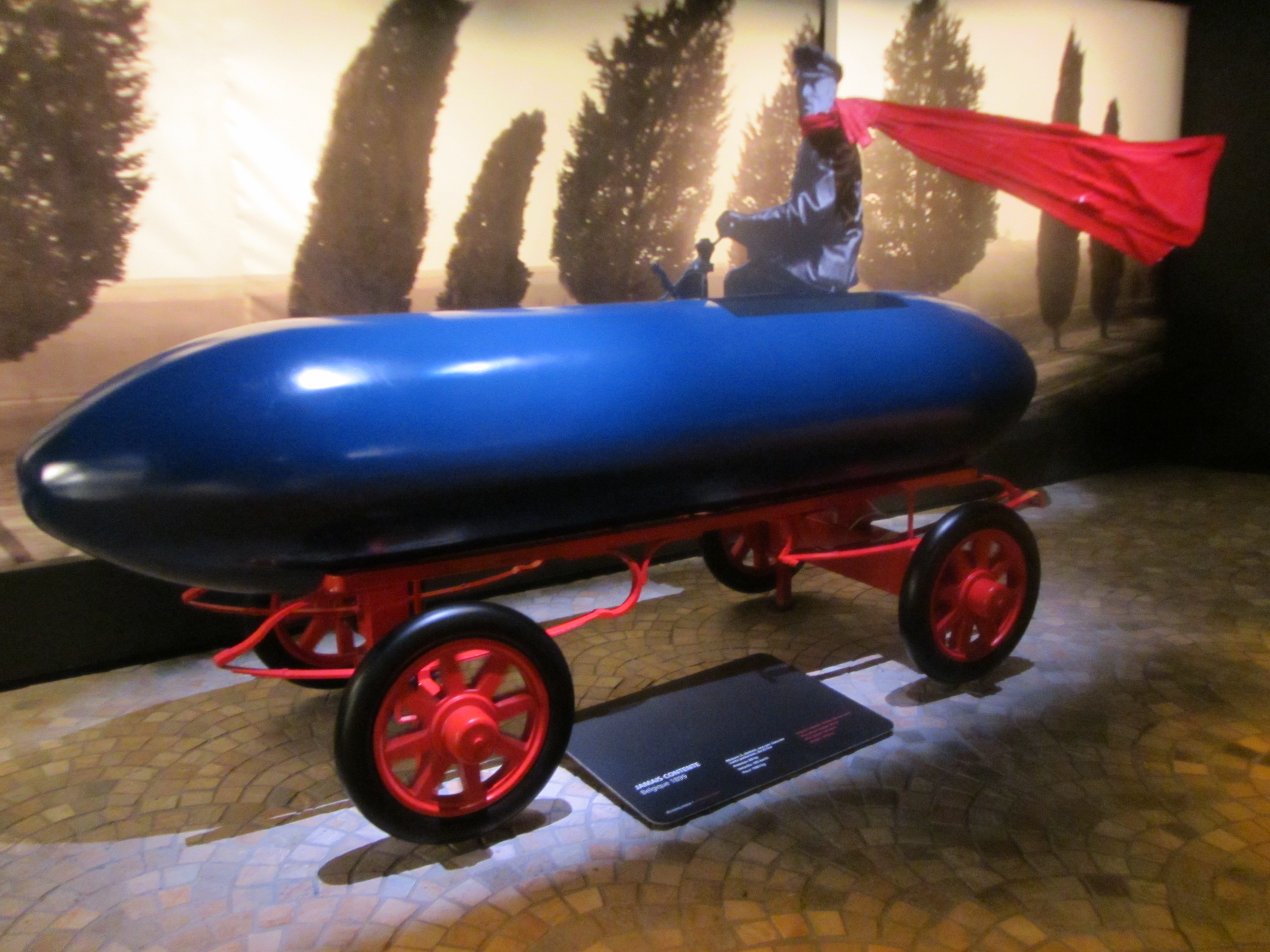 Replica della Jamais Contente al Museo Nazionale dell'Automobile di Torino